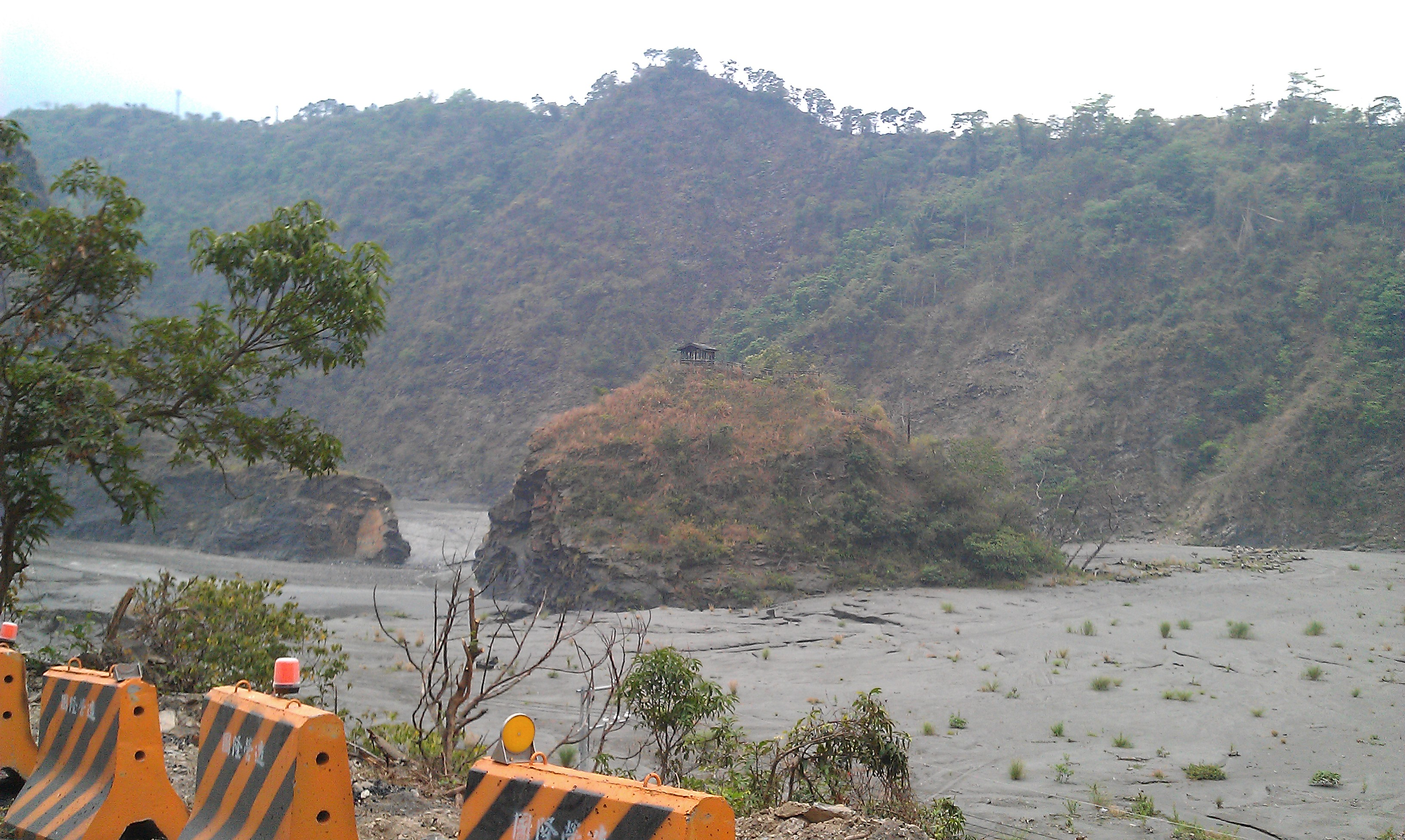 851, Taiwan, 高雄市茂林區萬山里